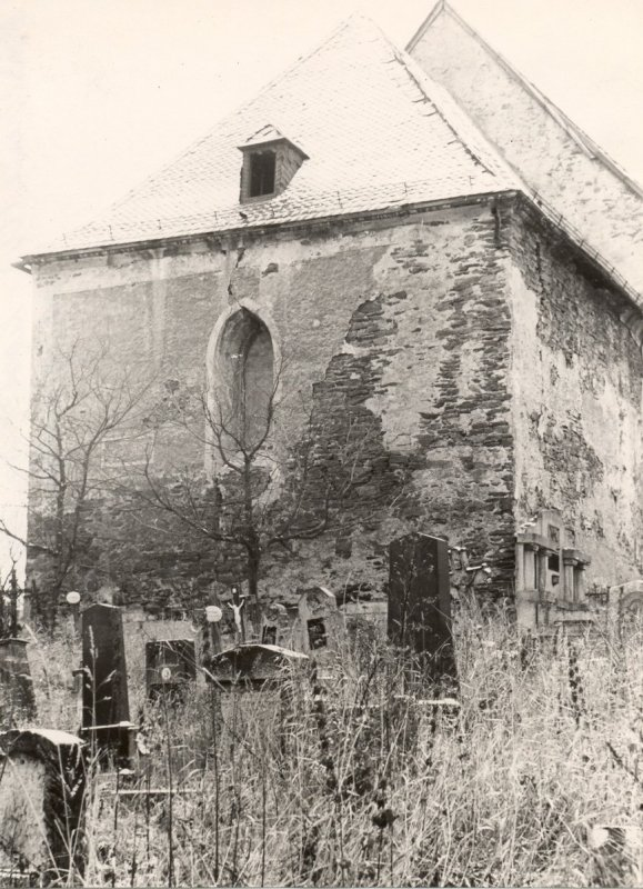 Kostel svatého Mikulášev Přísečnici